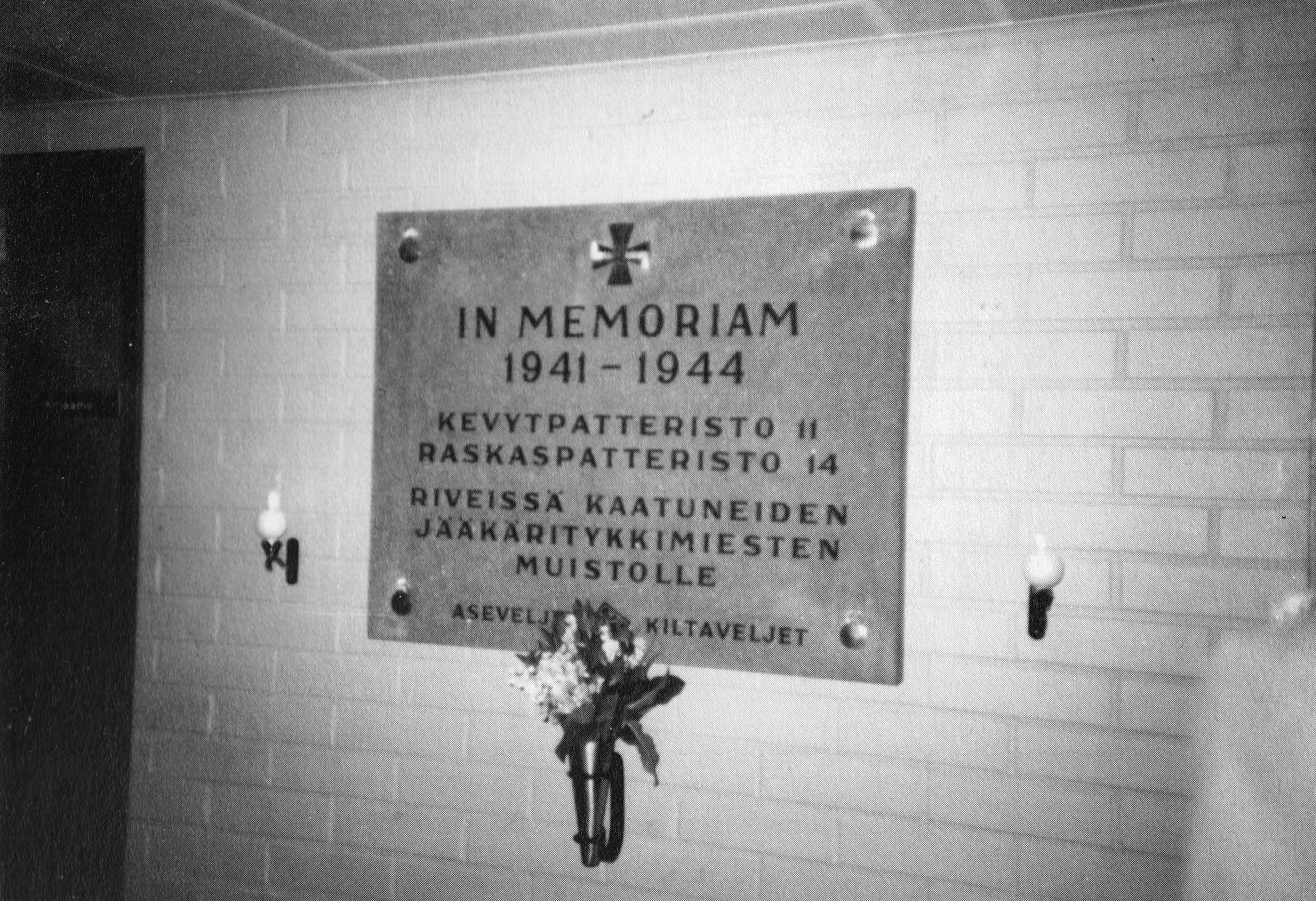 Kevyt Patteristo 11:n ja Raskas Patteristo 14:n riveissä kaatuneiden jääkäritykkimiesten muistotaulun luovutus Jääkäripatteristossa 23.3.1985 (Saarto 1985, 211).